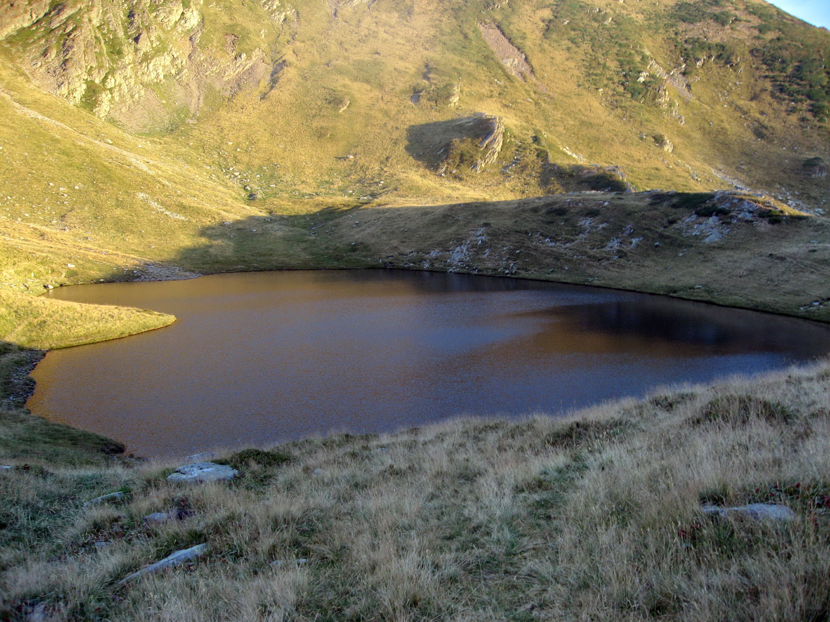 Jezero Scărişoara